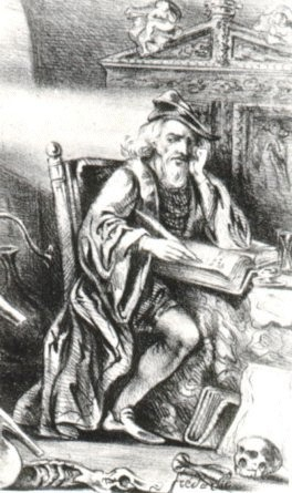 Nicolas Flamel (gravure romantique)